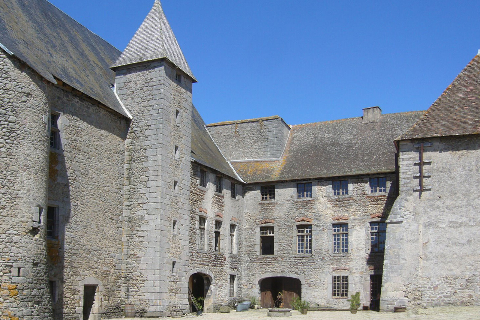 ancienne commanderie de l'ordre de Saint-Jean de Jérusalem datant du XIIe siècle à Lavaufranche (Creuse) France